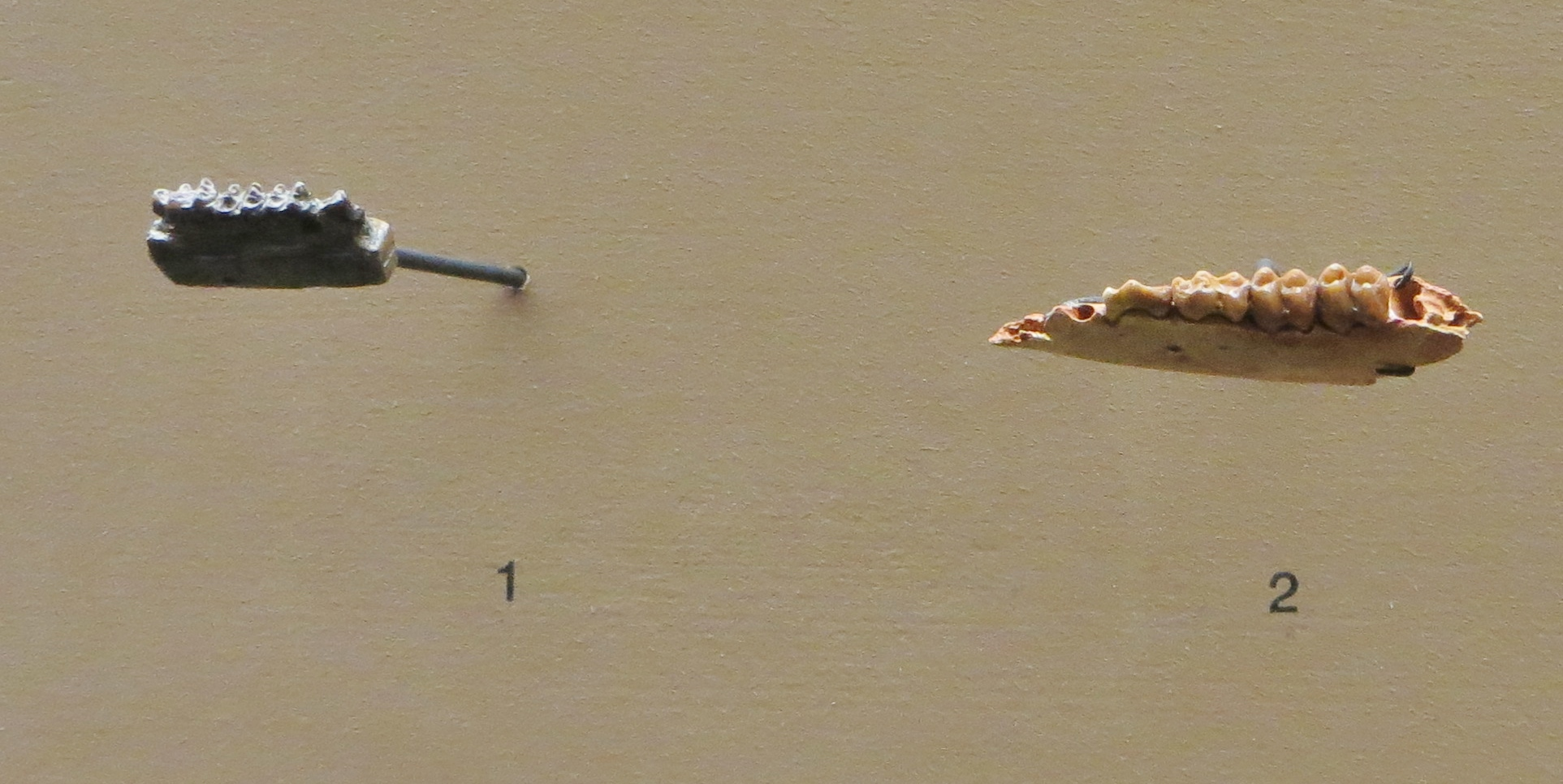 Fossil of Dichobune - Took the picture at Natural History Museum, Basel